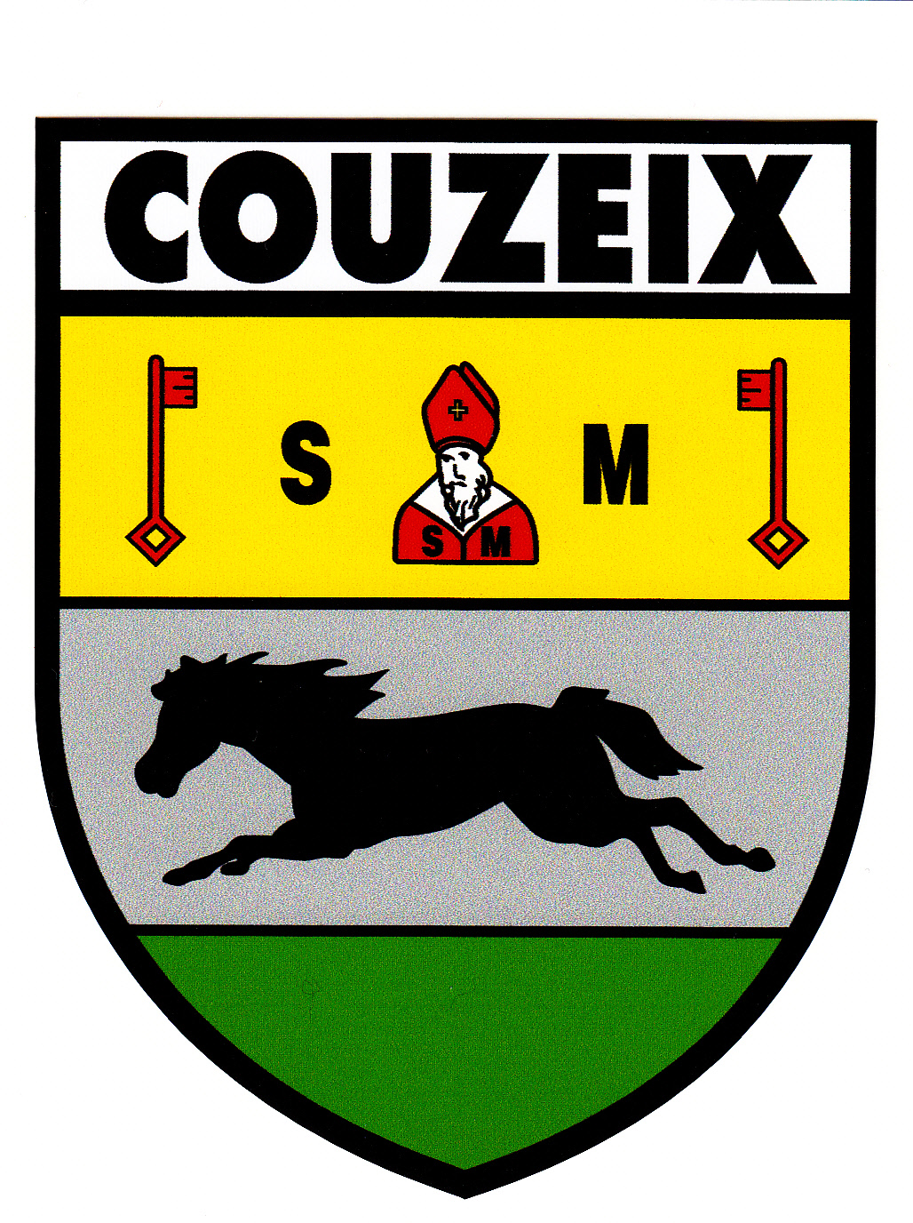 Blason de la Ville de Couzeix